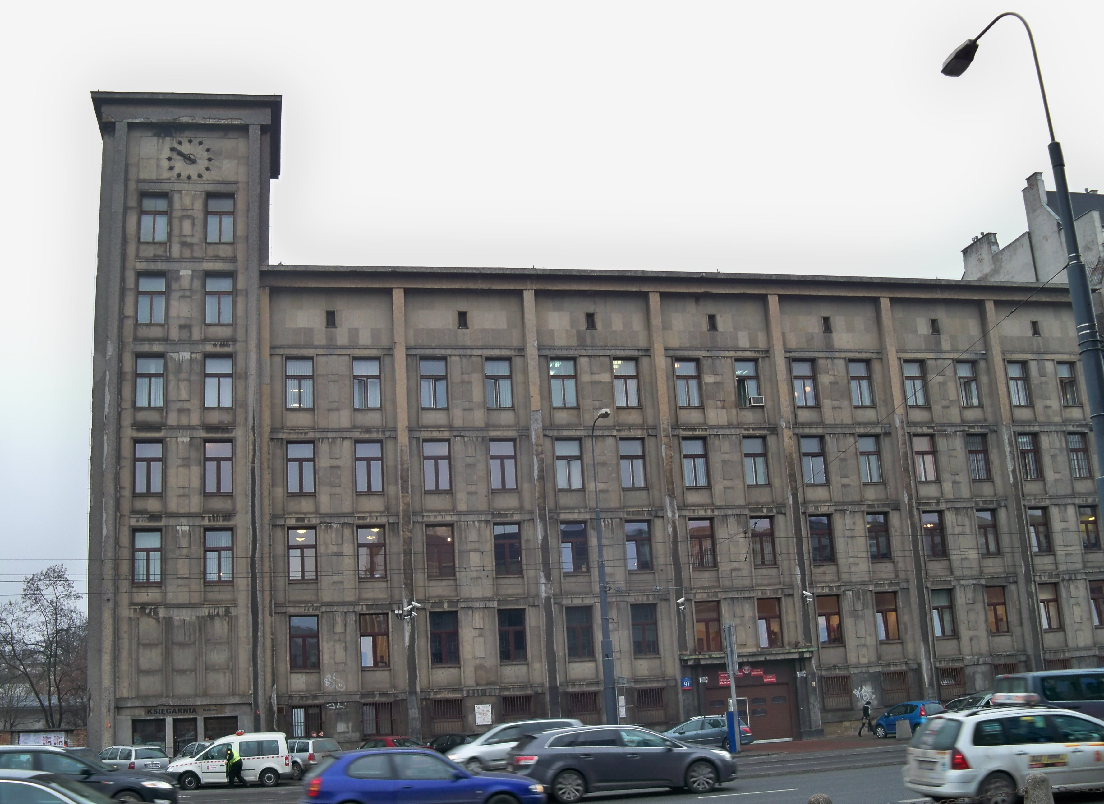 Gmach byłego Wojskowego Instytutu Geograficznego, Aleje Jerozolimskie 91 w Warszawie.